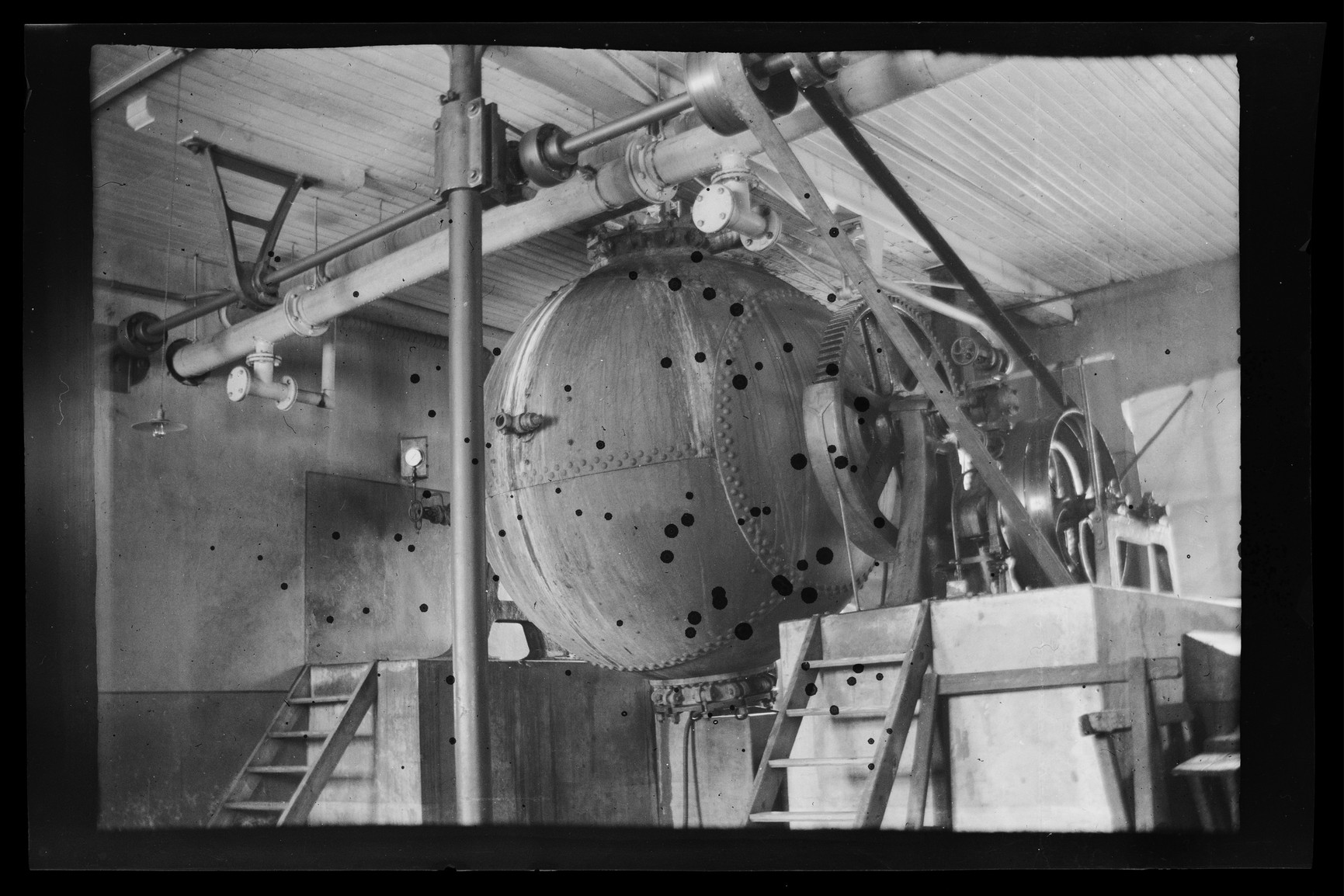 HS Modeller Kymmene, Karl Swanljung -adressen 11.1 valokuvafilmi, selluloosanitraatti, leveys 82 mm, korkeus 55 mm Asiasanat: valokuvat, laite(keittokuula), Kymintehdas(Kymmene Aktiebolag, Kymin Oy), paperitehdas, Kuusankoski, massankeitto, selluloosa ; Karl Swanljung -adressi, malli teoksiin Keittokuula I-II Hugo Simbergin jäljillä - Kansallisgalleria, Hugo Simbergin arkisto